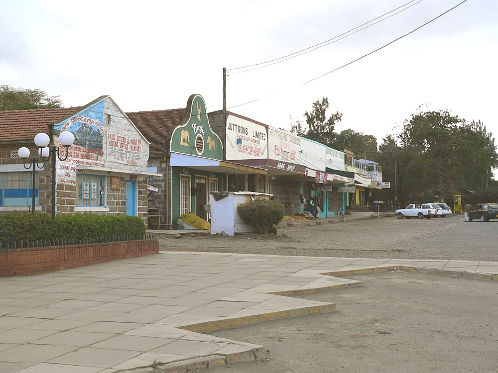 Shops along main street Nanyuki, Kenya